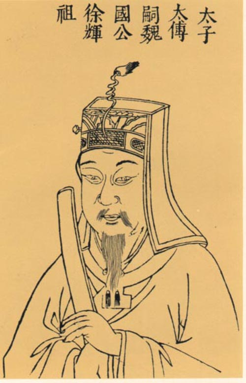 徐辉祖，明朝军事将领